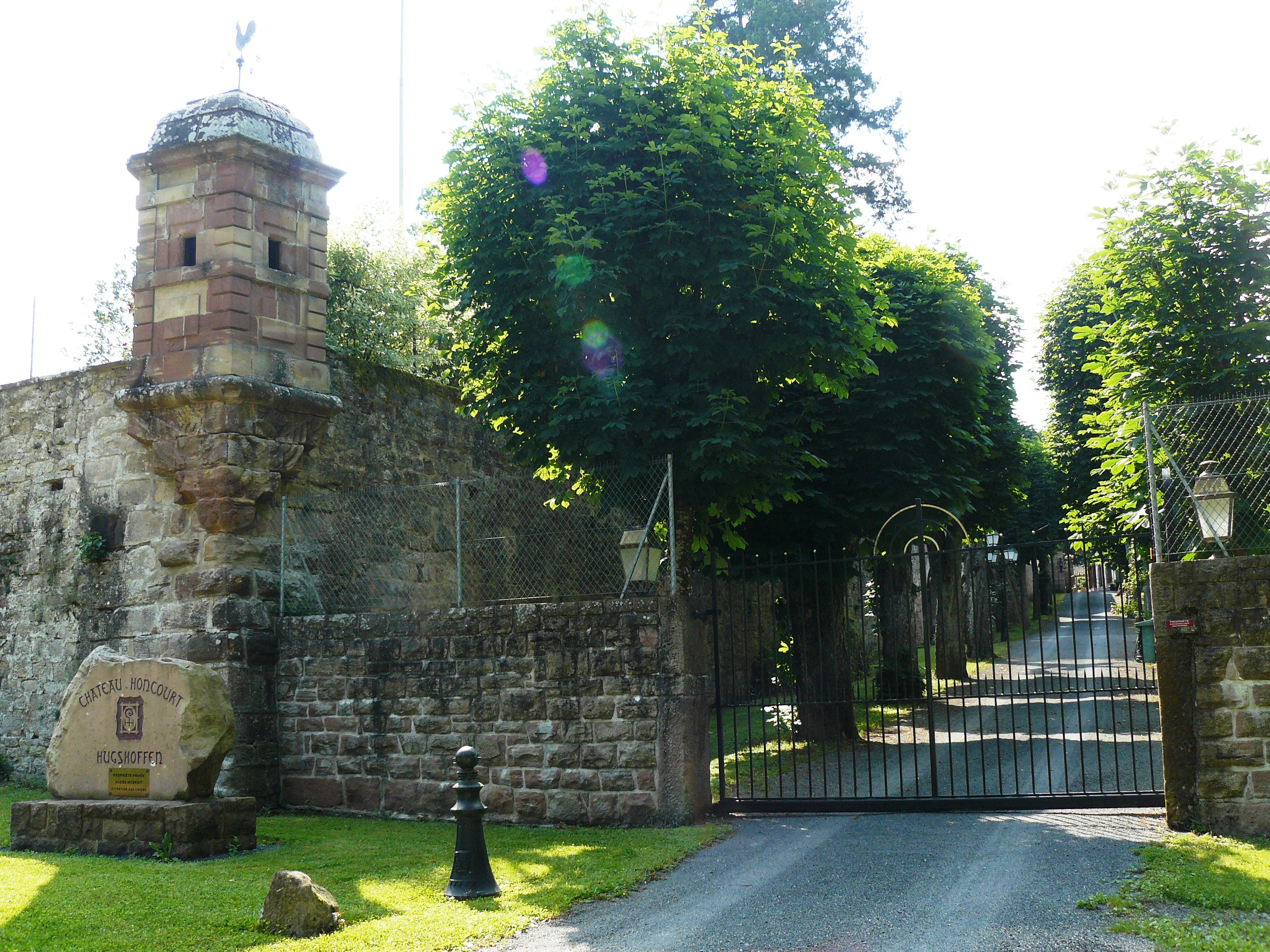 Ancien emplacement de l'abbaye de Honcourt, aujourd'hui baptisé le Château de Hugshaufen